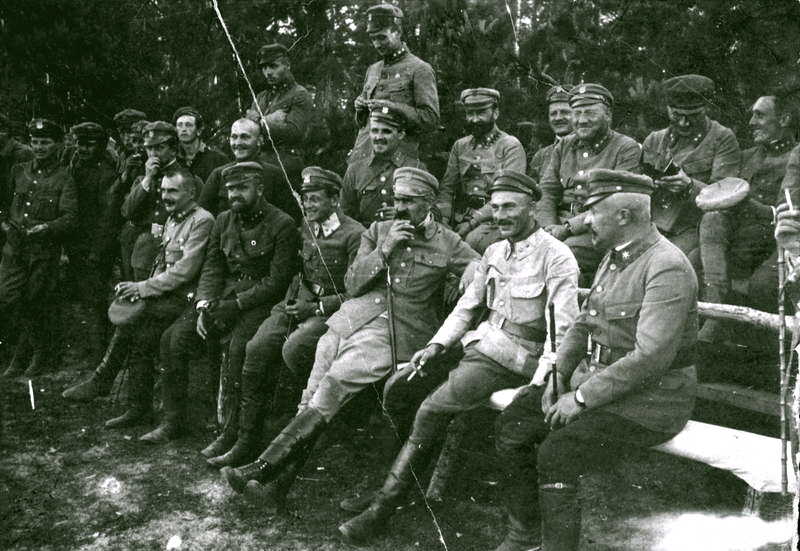 Беларуская (тарашкевіца): Легіёны на ўсходнім фронце - Юзэф Пілсудзкі (у першым радзе трэці з права) са штабам ў ваколіцах Маладэчна.